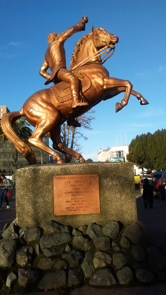 Estatua de Bernardo Ohíggins en la Plaza de Armas de Los Angeles, Chile